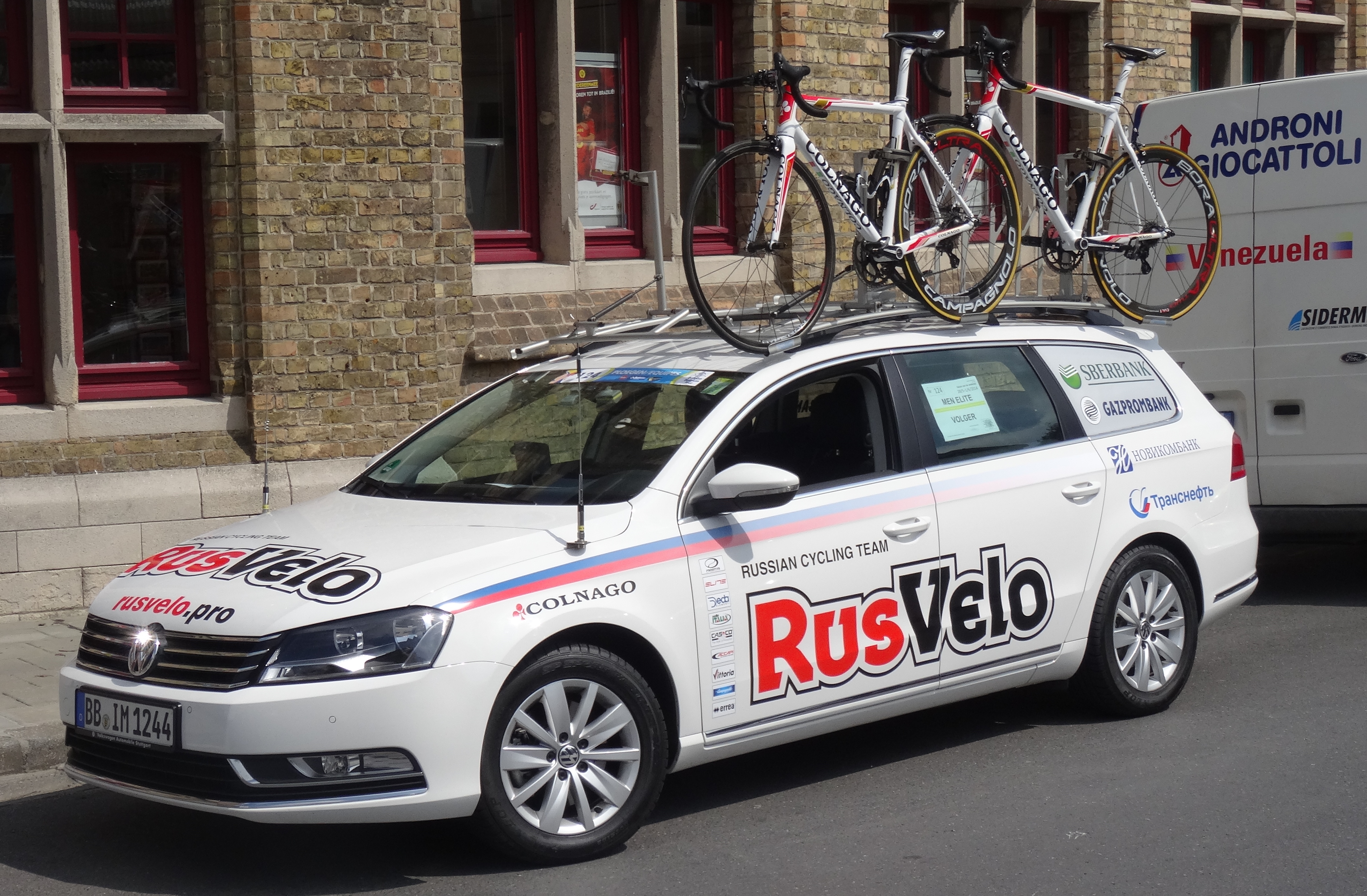 Reportage photographique réalisé le vendredi 30 mai à l'occasion du contre-la-montre individuel de la troisième étape du Tour de Belgique 2014 à Dixmude, Belgique.